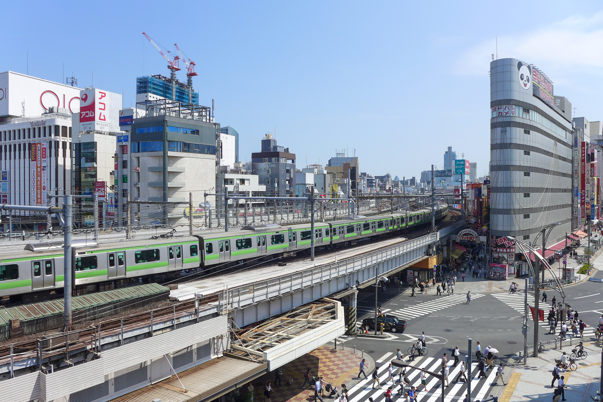 Ueno